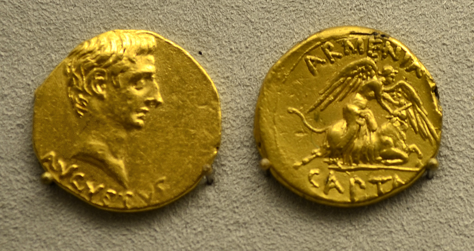 Berlin Pergamonmuseum, Aureus, FO: Pergamon, kaiserzeitlich, VS: AVGVSTVS,.RS: ARMENIA CAPTA, 19-18 v.u.Z